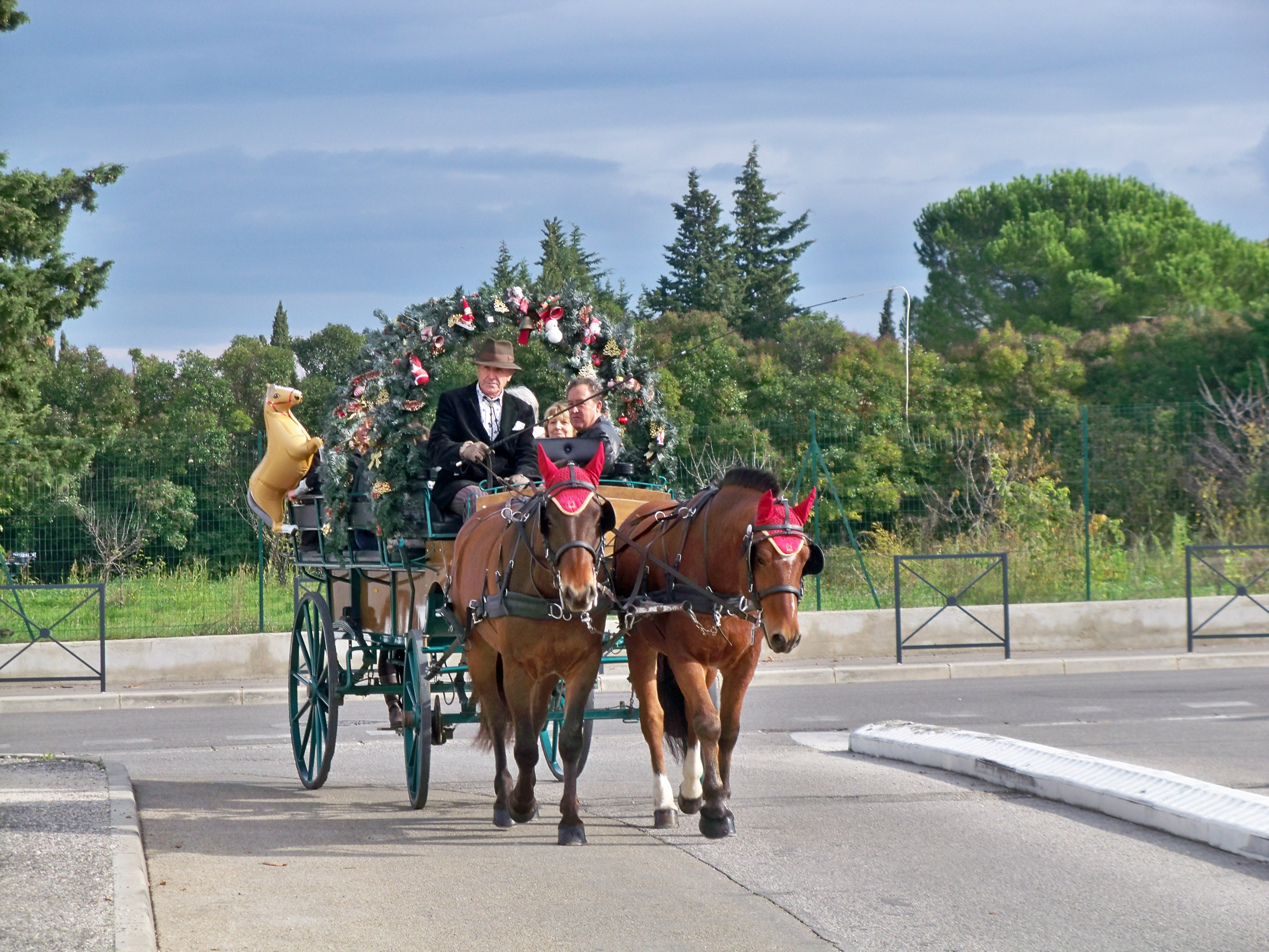 calèche servant de navette pendant le marché de noël de Fontvieille, Bouches du Rhone, France